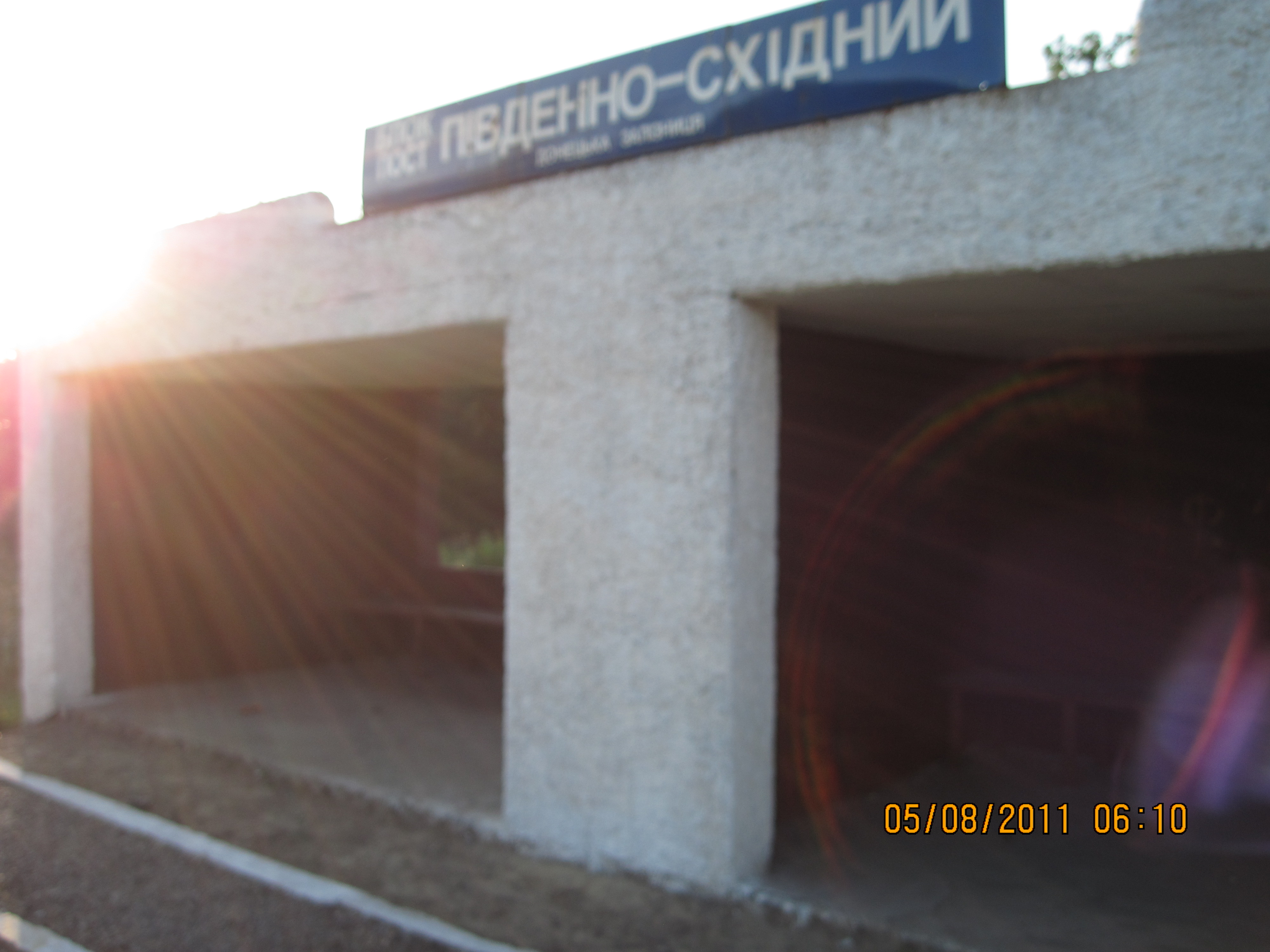 Блокпост Південно-Східний